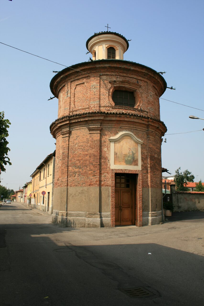 Nerviano (Milano): La Rotondina.